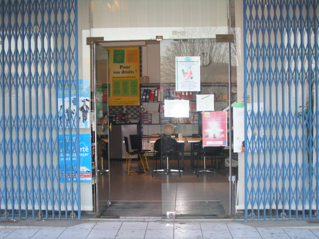 La devanture de l'espace R.M.I.